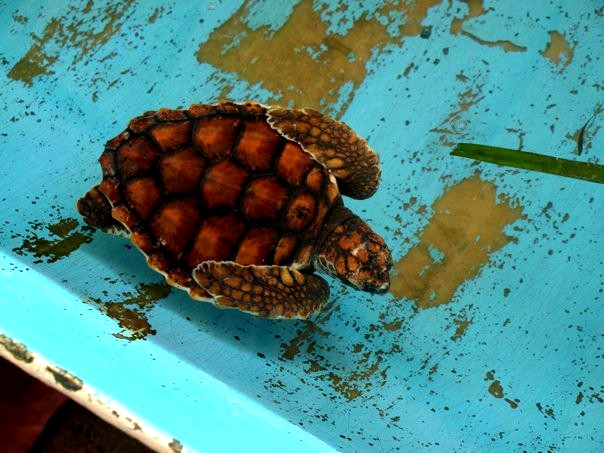 Tortuga verde (Chelonia mydas) de los Roques Venezuela